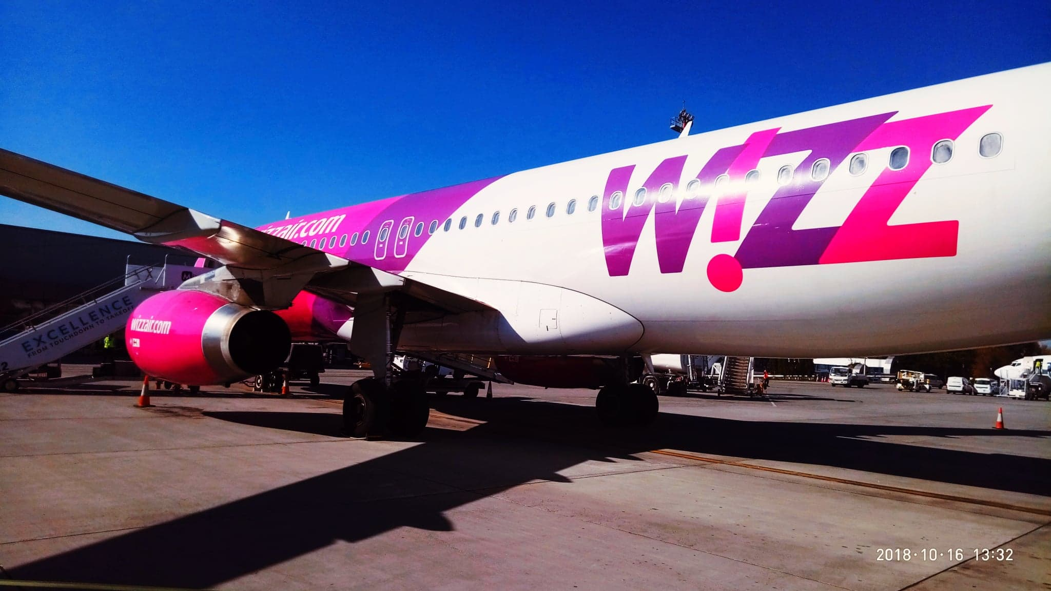 Wizz Air στο αεροδρόμιο του Ιασίου